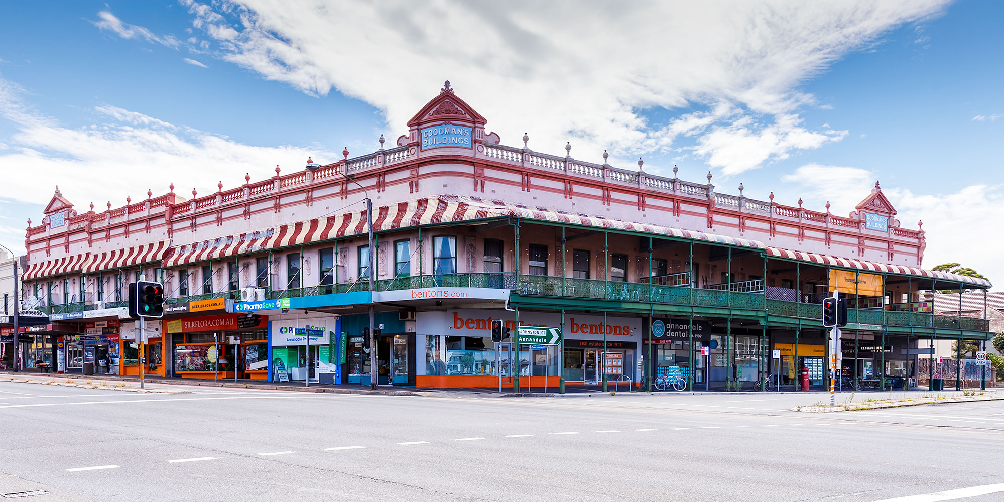 Goodman's Buildings